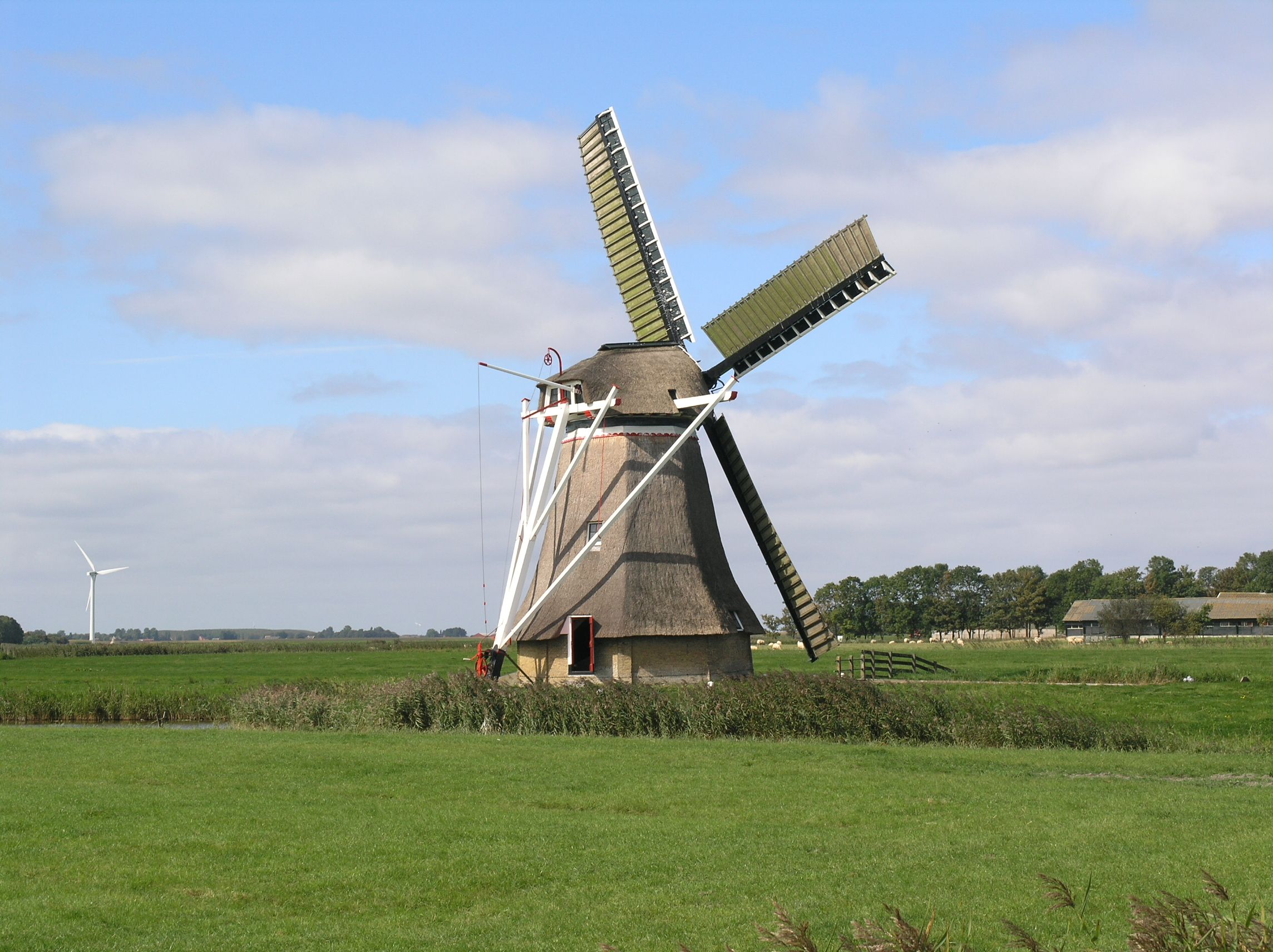 Holwerd Poldermolen Miedenmolen